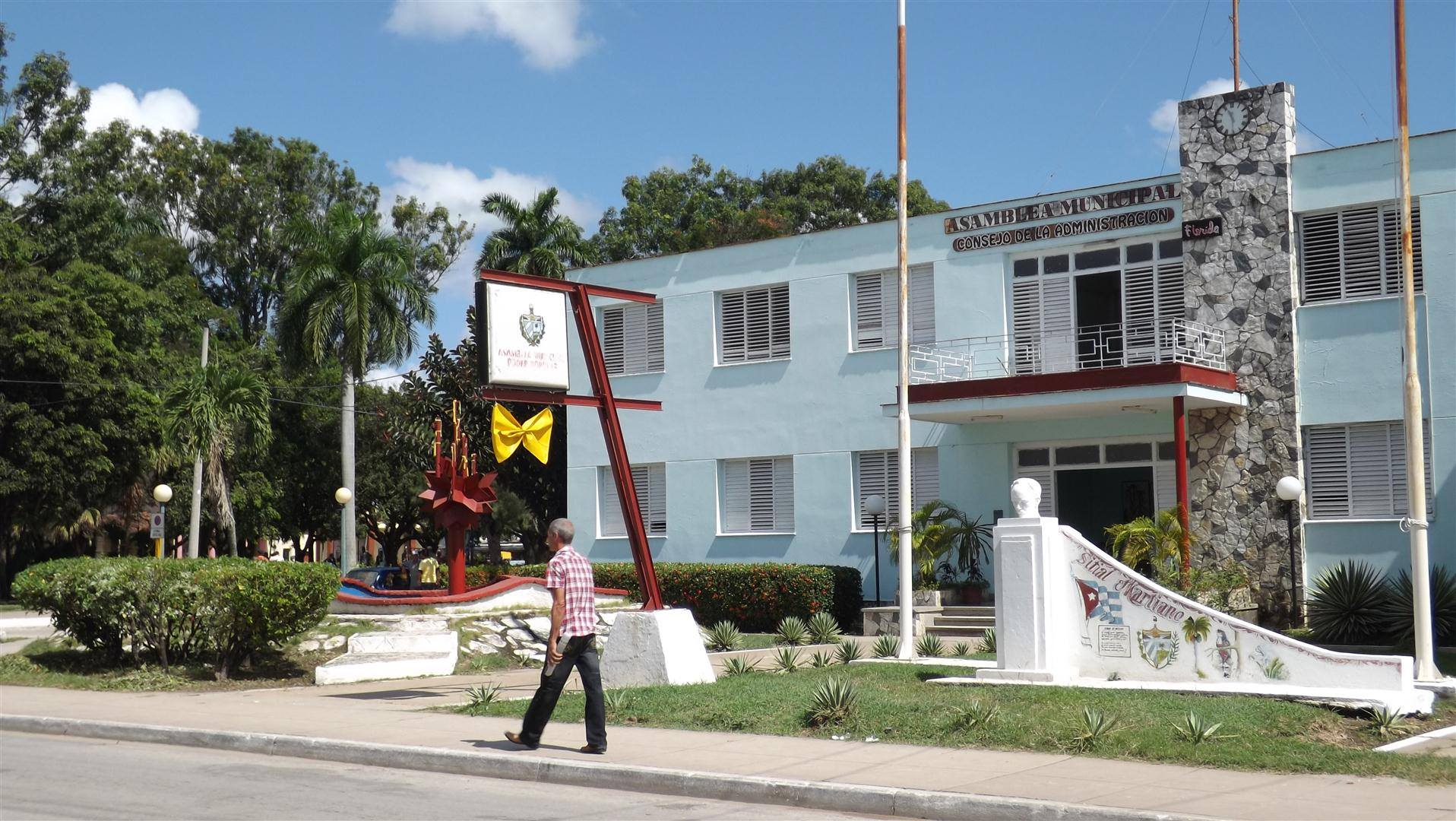 Florida, Cuba